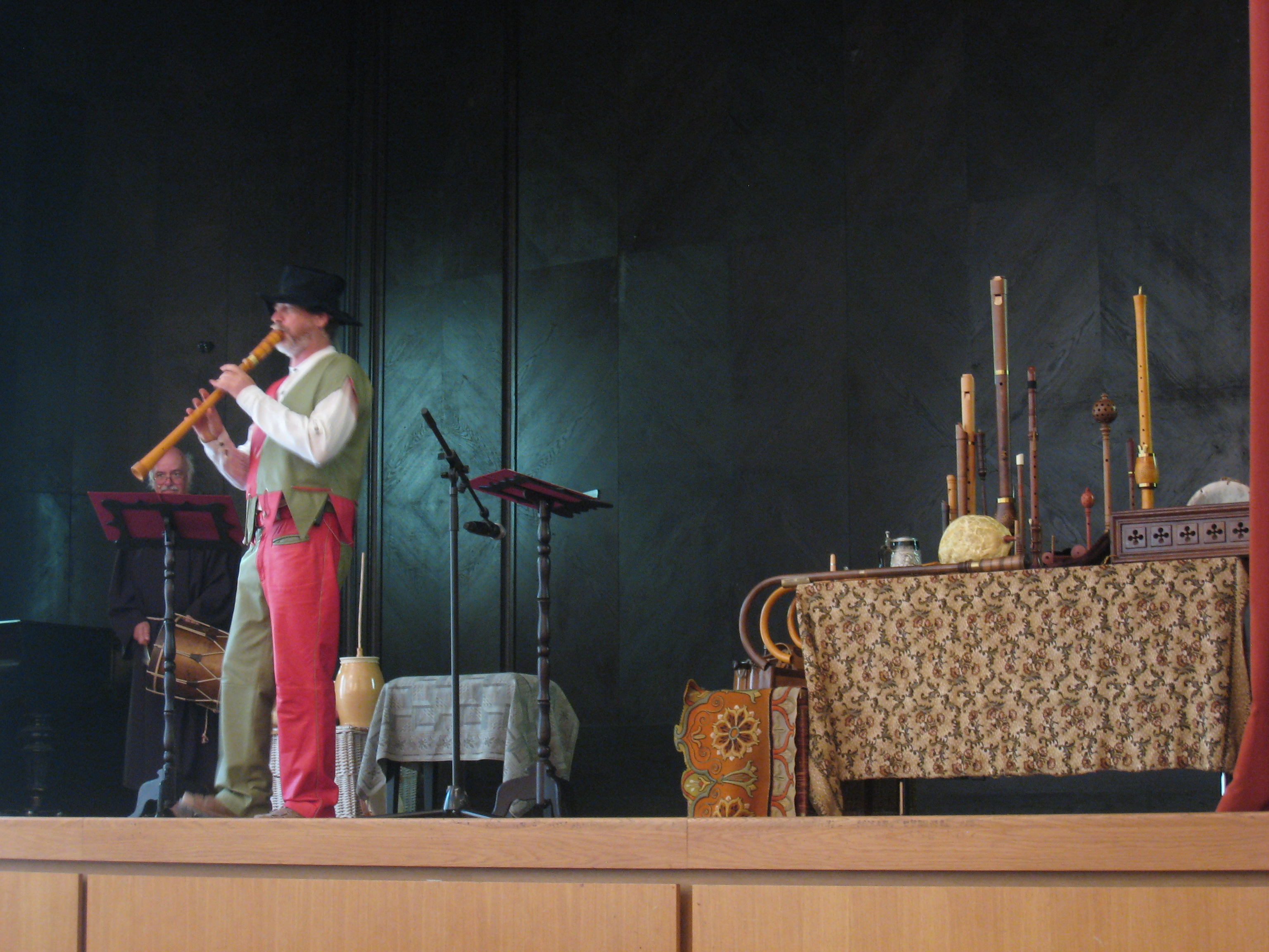 Dieter Schumann als Spielmann Max, Juli 2014